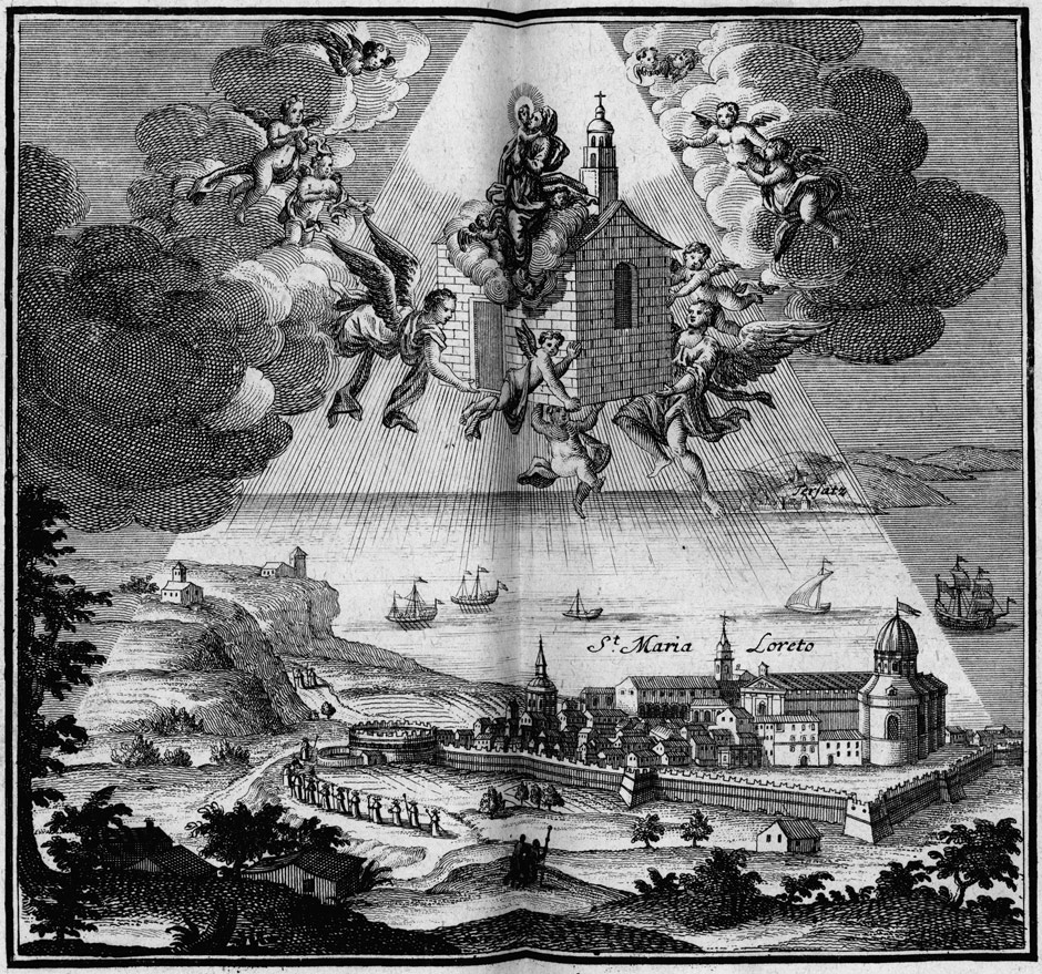 Frontispiz zu: (Baldassare Bartoli): Historische Beschreibung Des Heil. Hauses zu Loreto, Frankfurt, J. L. Buchner, 1725